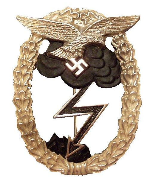 Erdkampfabzeichen der Luftwaffe